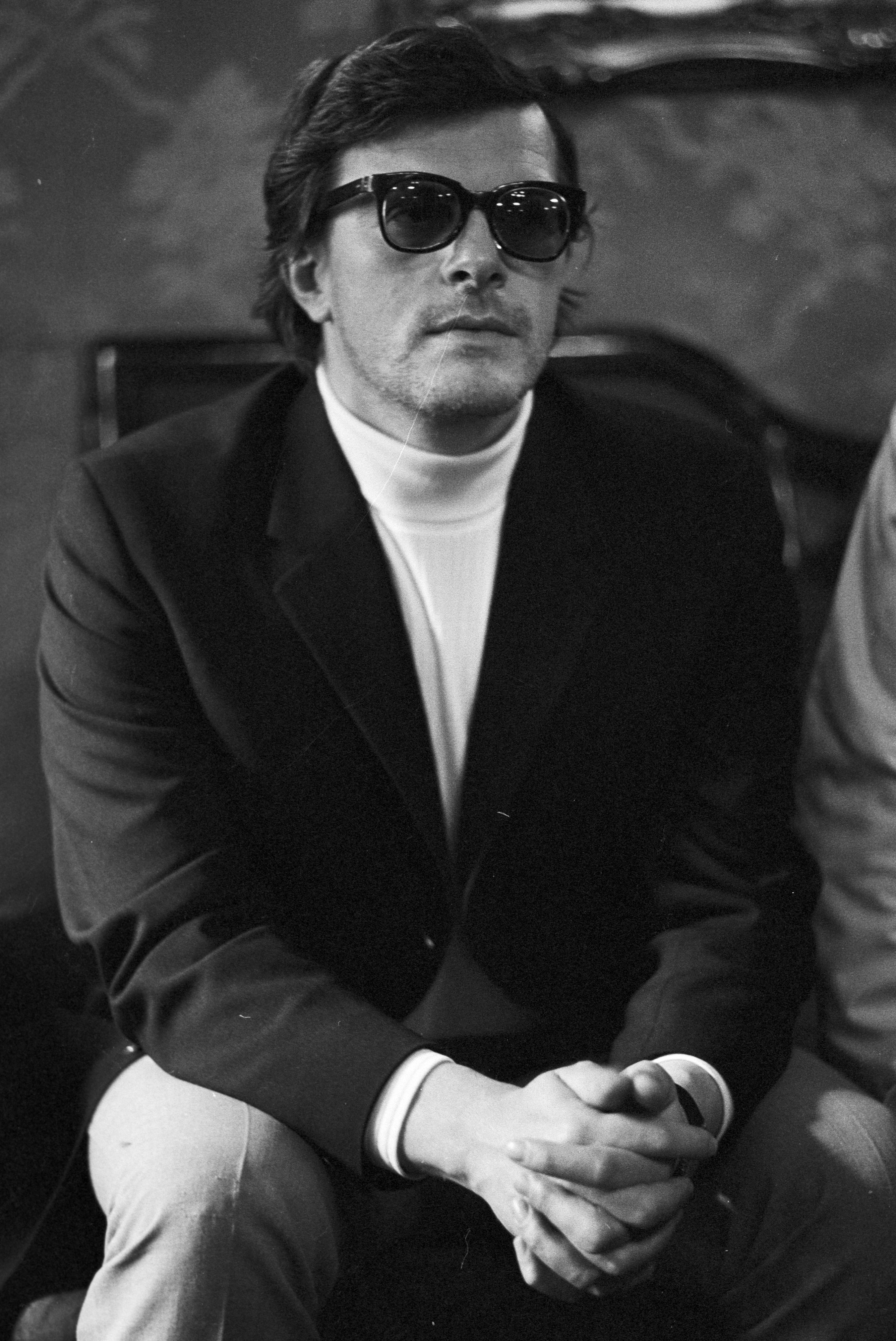 Portrett av Jan Kacer tatt i forbindelse med Nationaltheaterets oppsetning av "Kirsebærhaven".